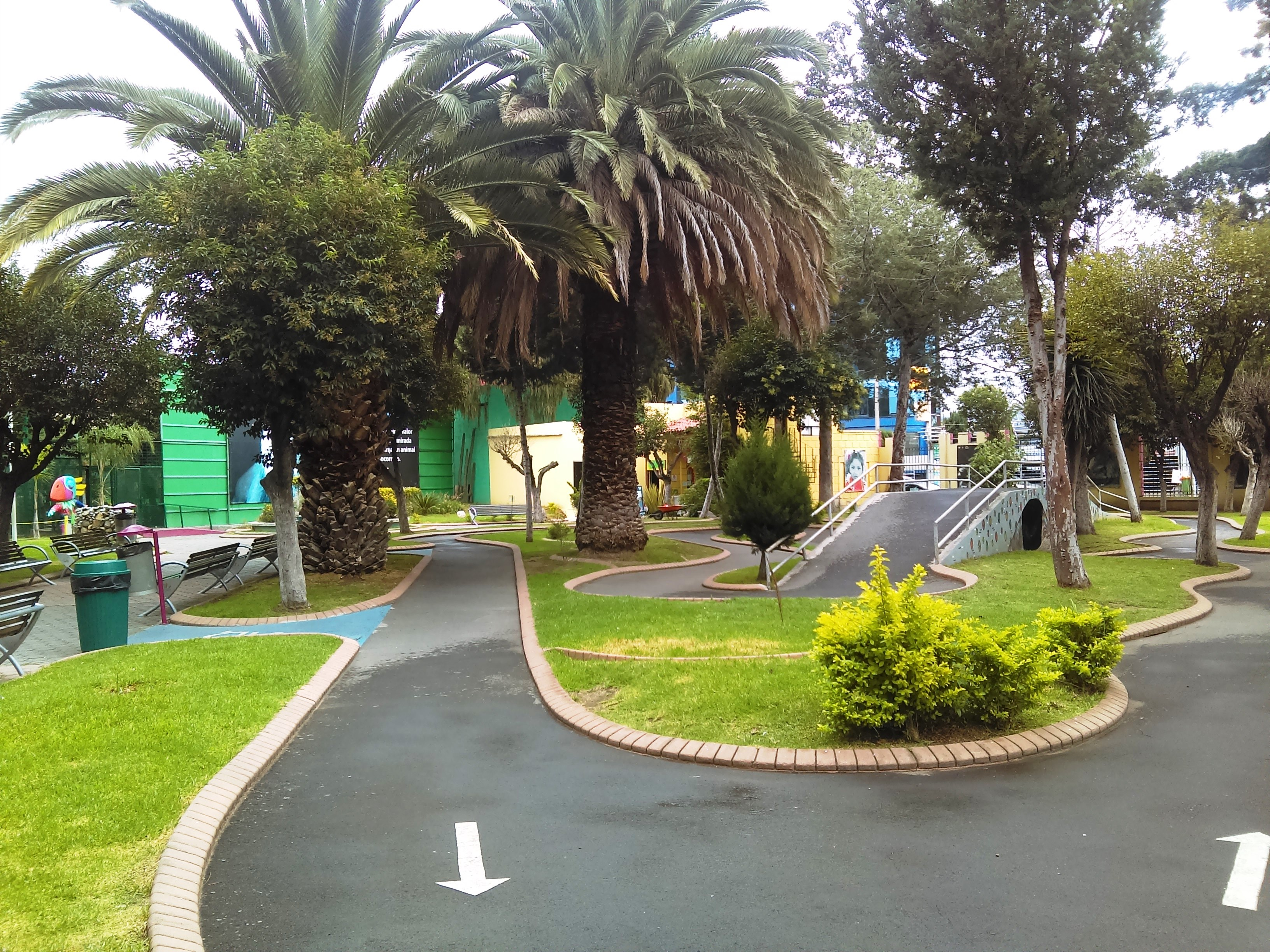 Bioparque de Convivencia en Pachuca, Hidalgo, México.